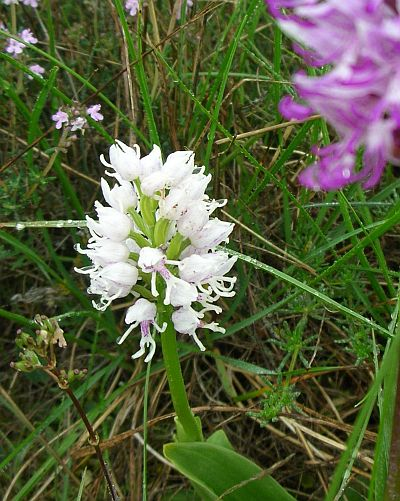 Fast vollständig weißes Affen-Knabenkraut neben "normal" gefärbtem